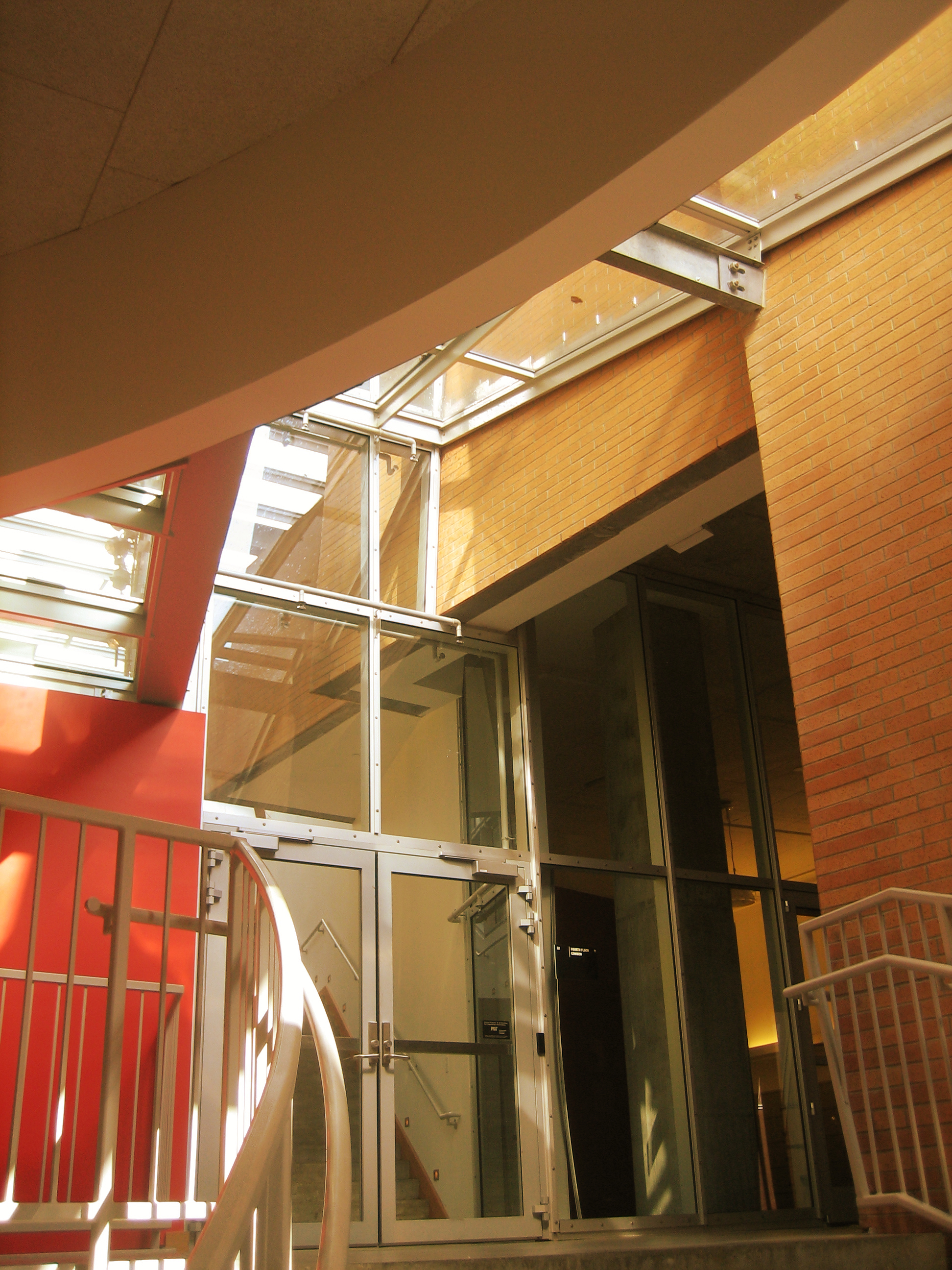 interior detail, stata center, MIT. just outside science commons offices.